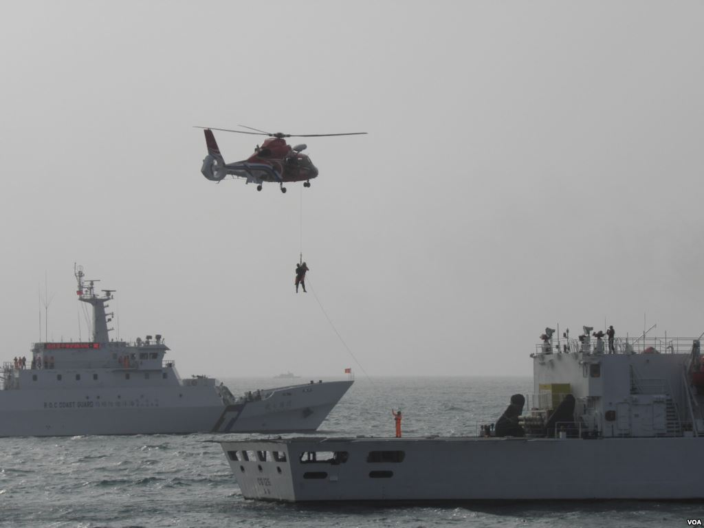 行政院海岸巡防署艦艇與內政部空中勤務總隊直昇機於高雄港外實施海上救援演練。